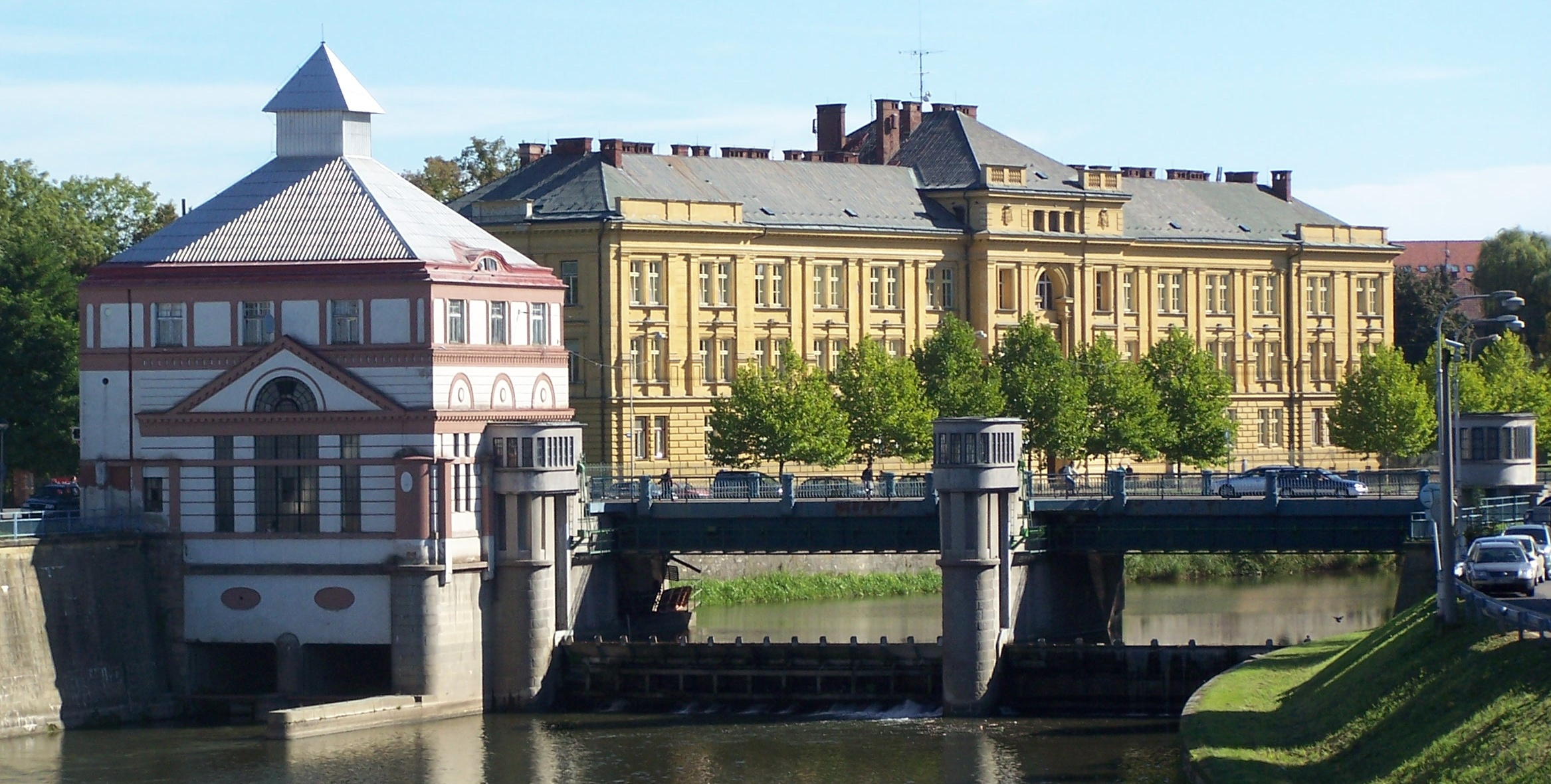 Silniční most - Moravský most s elektrárnou (Hradec Králové), přes Orlici, Ignáta Hermana, Hradec Králové